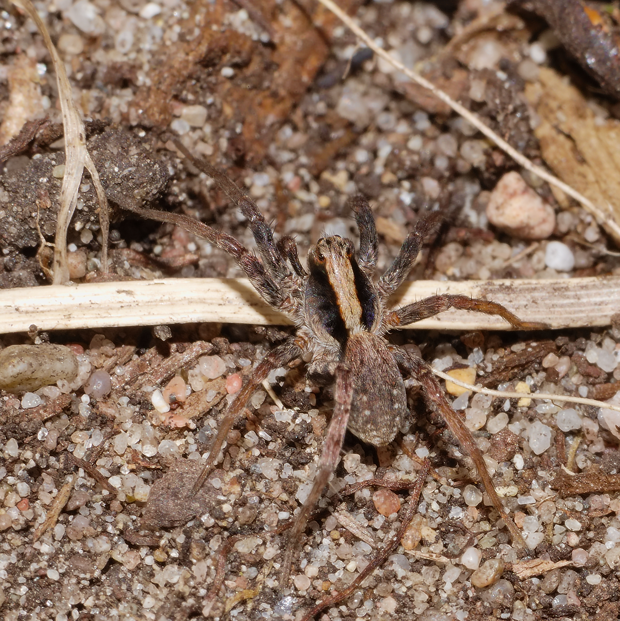 Wolfspinne - Xerolycosa nemoralis, Männchen. Aufgenommen in Mannheim im Käfertaler Wald, Baden-Württemberg, Deutschland.